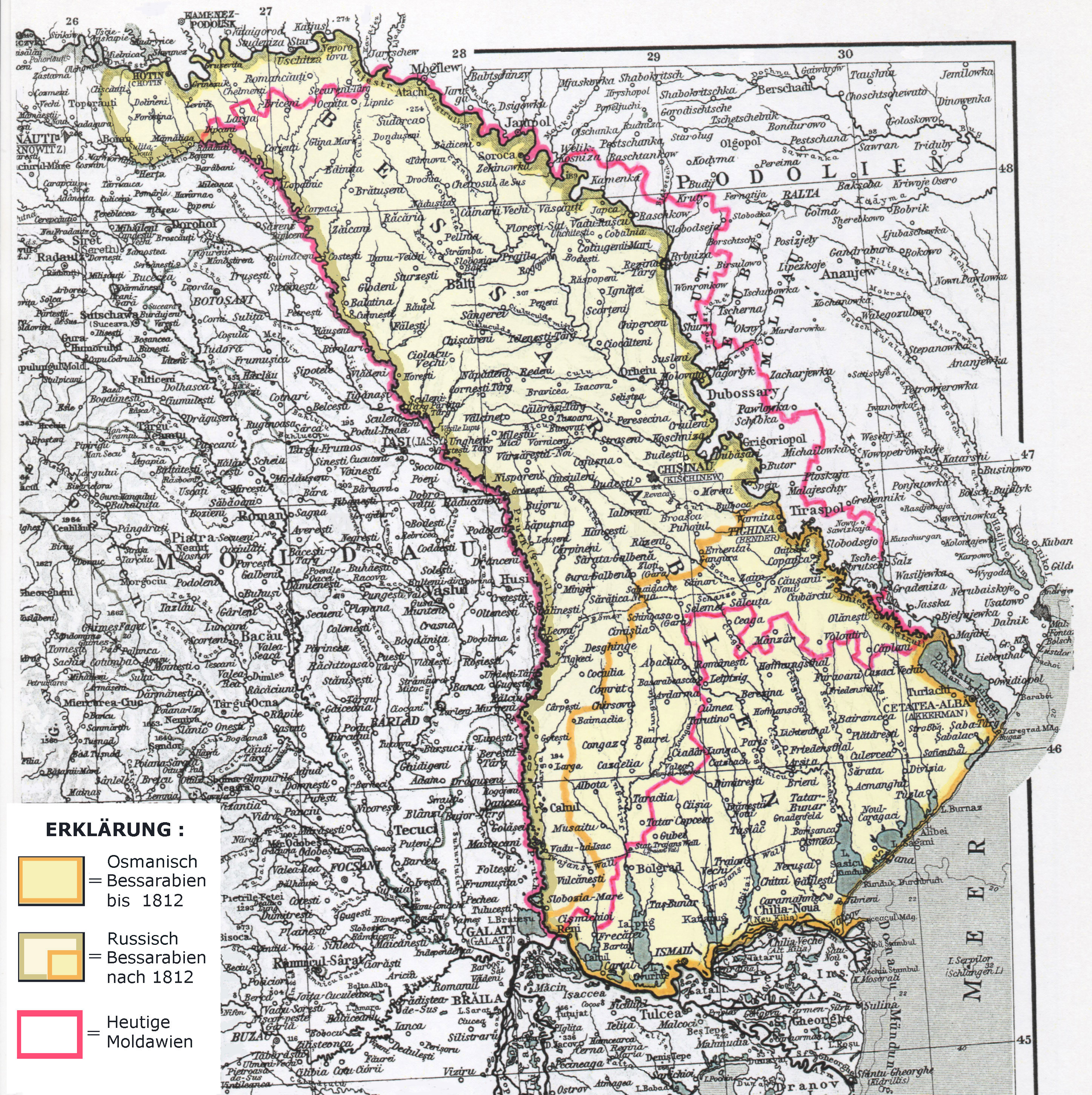 Historische Bessarabien und heutige Moldawien